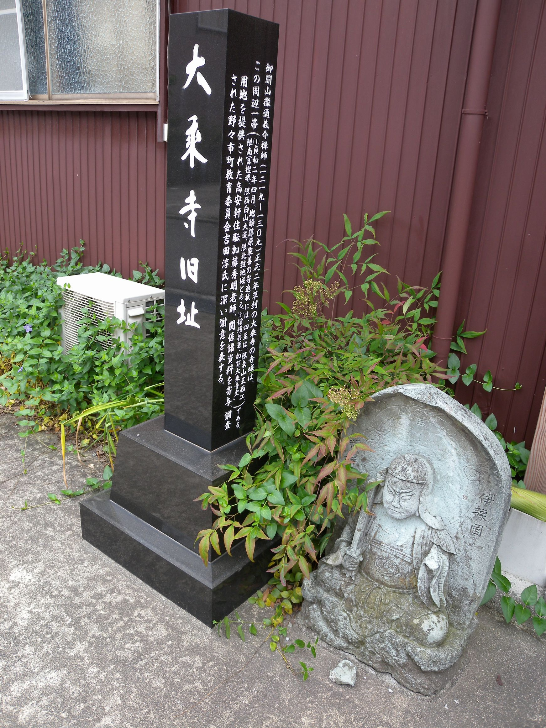 大乗寺開祖徹通義介の遺骨を安置する高案軒